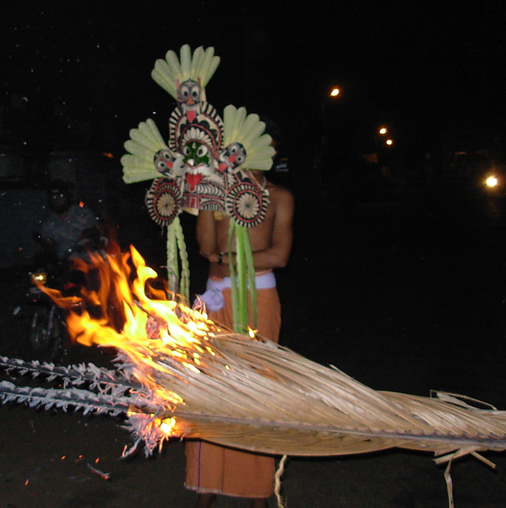 പടയണിയിലെ കാലന്‍ കോലത്തെ ക്ഷേത്രത്തിലേക്ക് എഴുന്നള്ളിക്കുന്നു